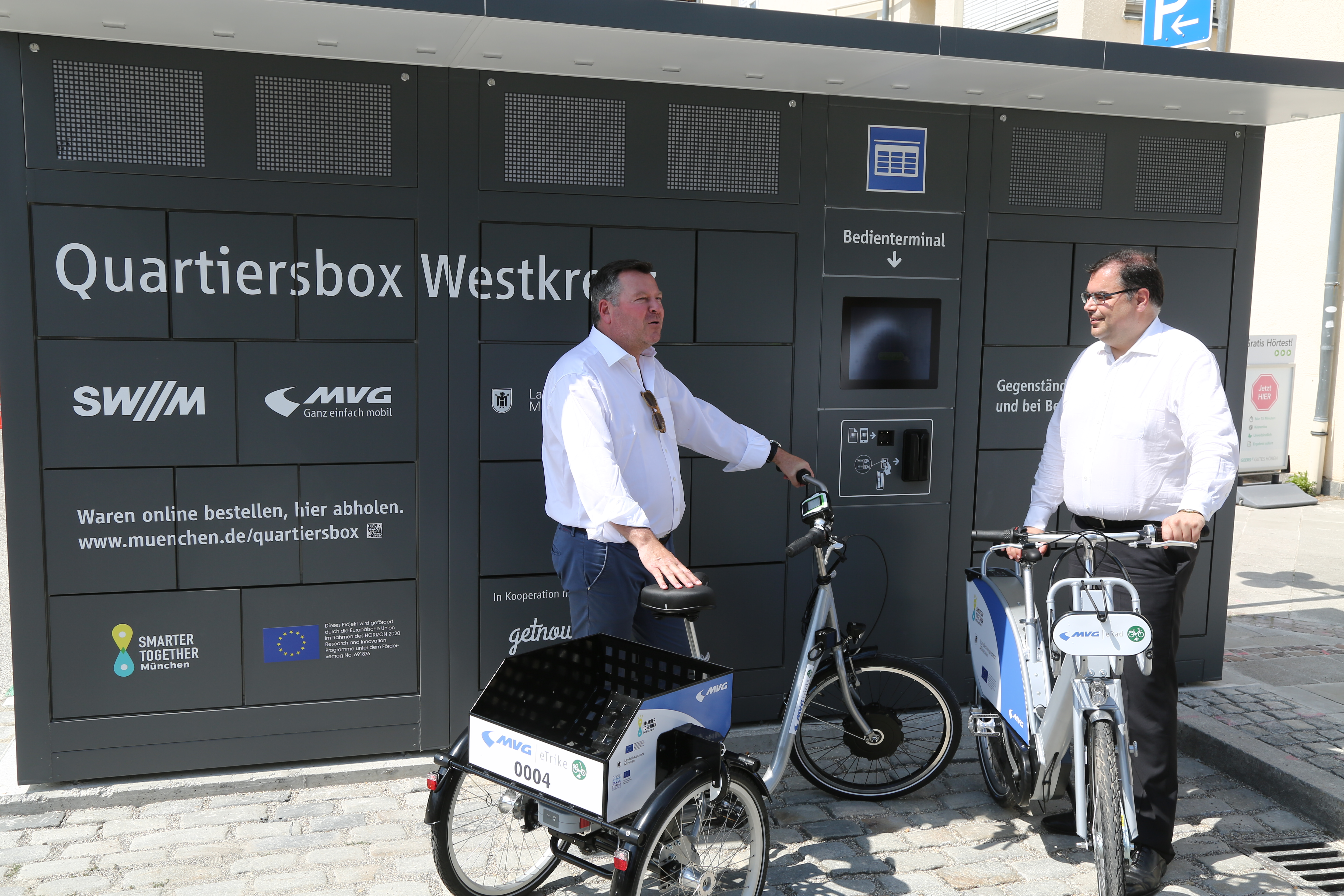 Eröffnung des Projekts Smarter Together im Müchner Modellstadtteil Neuaubing-Westkreuz am 2018-07-27, München, Wien und Lyon sind die Projektstädte eines EU-Projektes, in dem realisierbare Techniken der Smart City umgesetzt und im Massenmarkt getestet werden. Zu den Projekttechnologien gehört Mobilität mit Carsharing von Elektroautos, Mietfahrrädern, Miet-Pedelecs und E-Lastenrädern, Abhol- und Bringsysteme mit Quartierboxen. Förderung von Energie-Projekten im Bestandsbau und Sensorik im öffentlichen Raum.